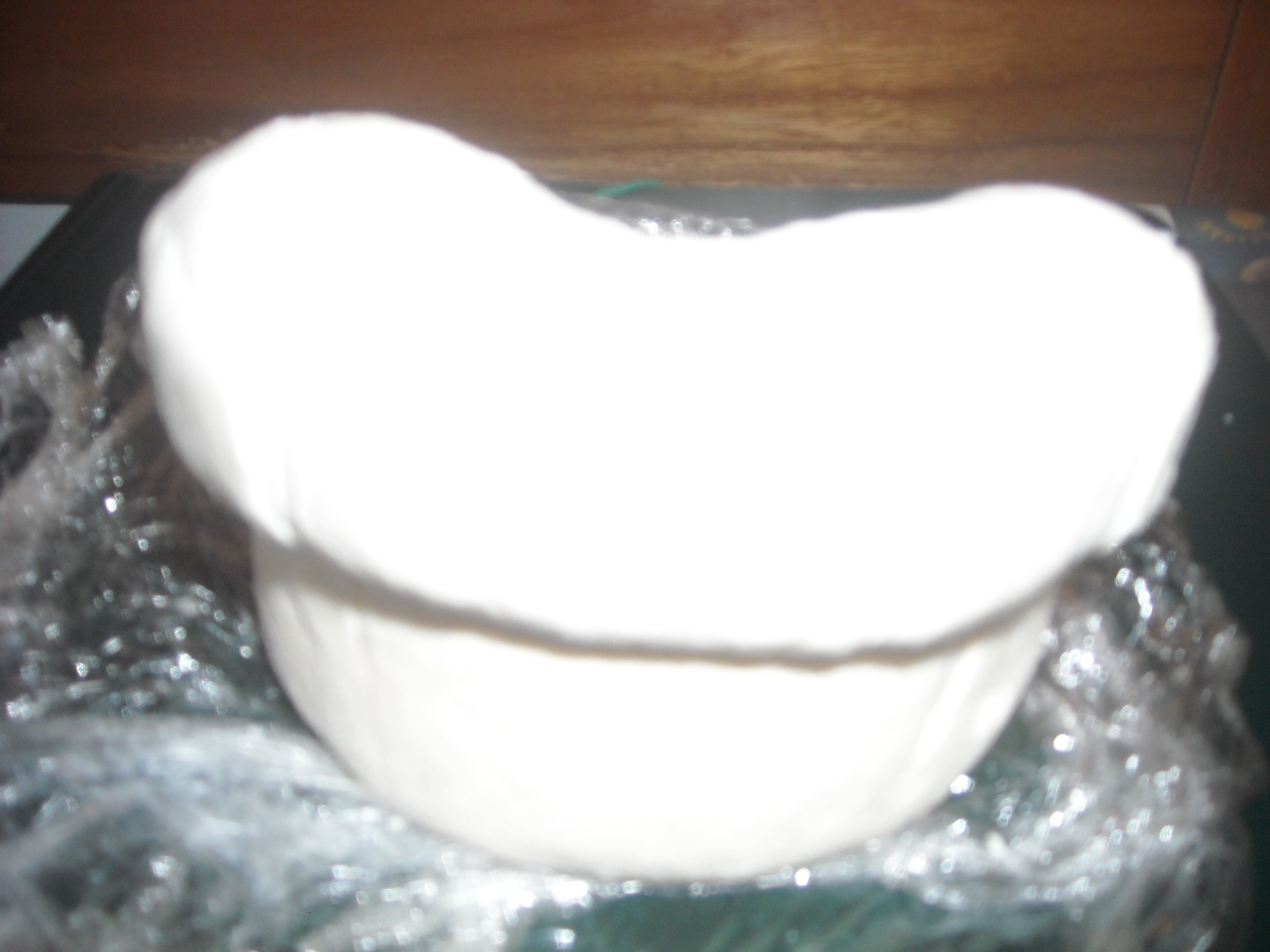 Medio queso cebreiro.